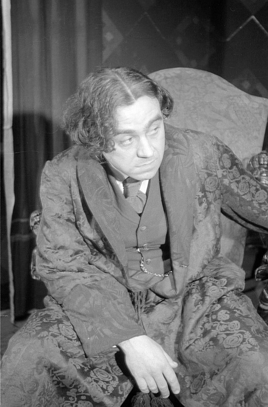 Original image description from the Deutsche Fotothek Paul Bildt als Prof. Serebrjanow, Paula Denk als Helena Andrejewna, seine Gattin, des weiteren Heinrich Greif, Walter Richter als I. P. Wojnitzki und Ruth Schilling